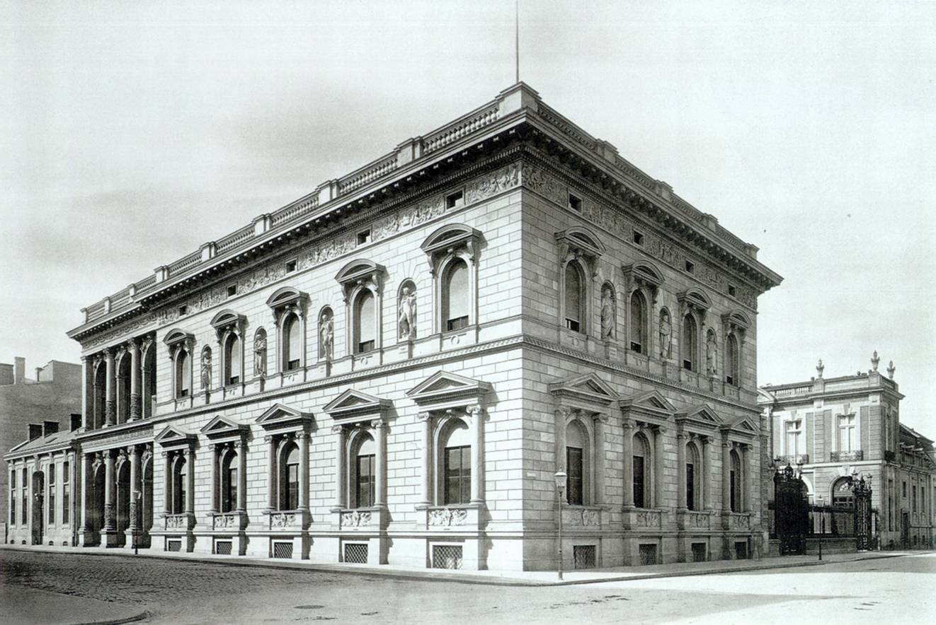 Berlin, Palais Borsig, Voßstraße 1 (Ecke Wilhelmstraße)